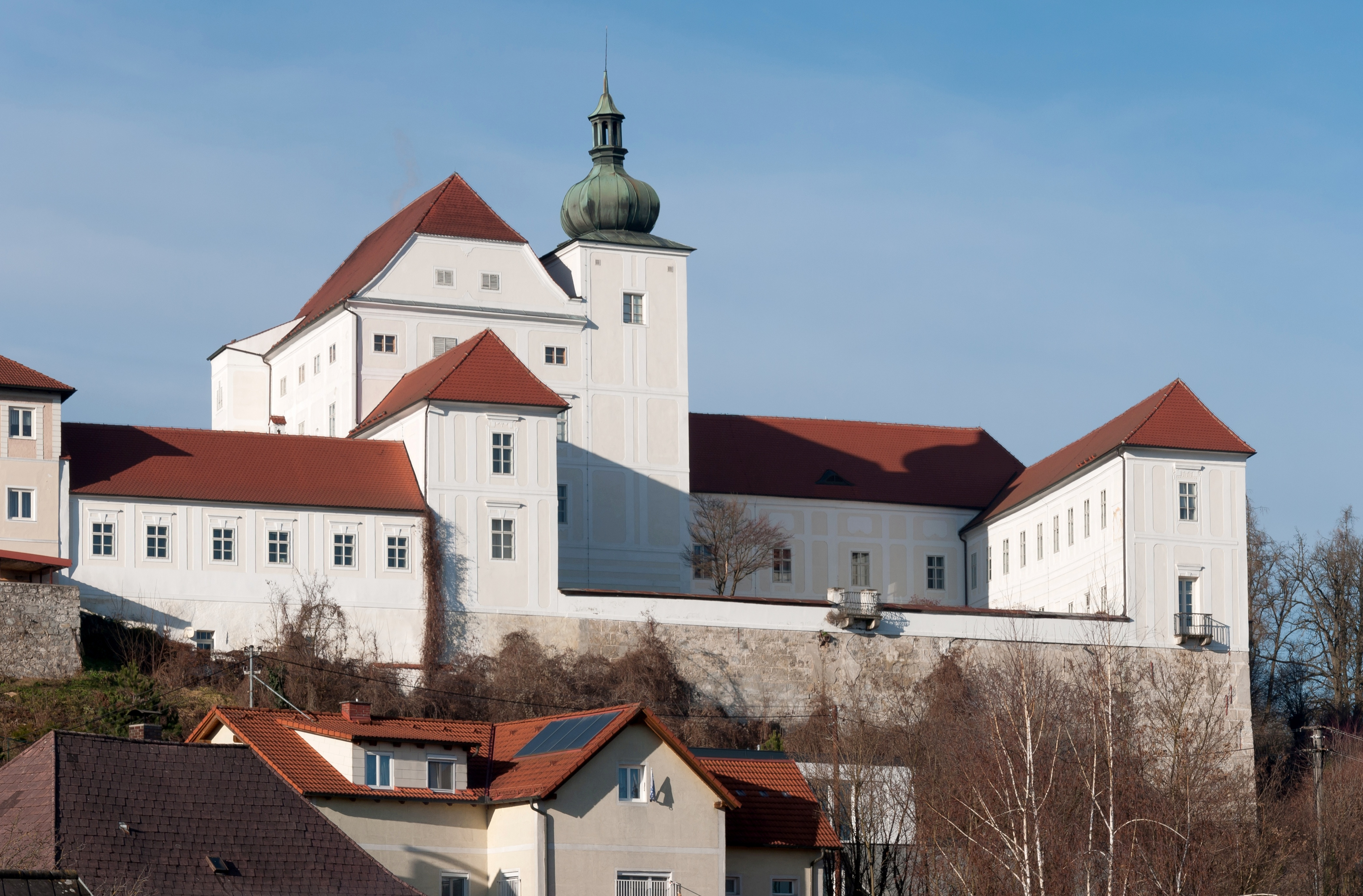 Schloss Ennsegg, Landesmusikschule